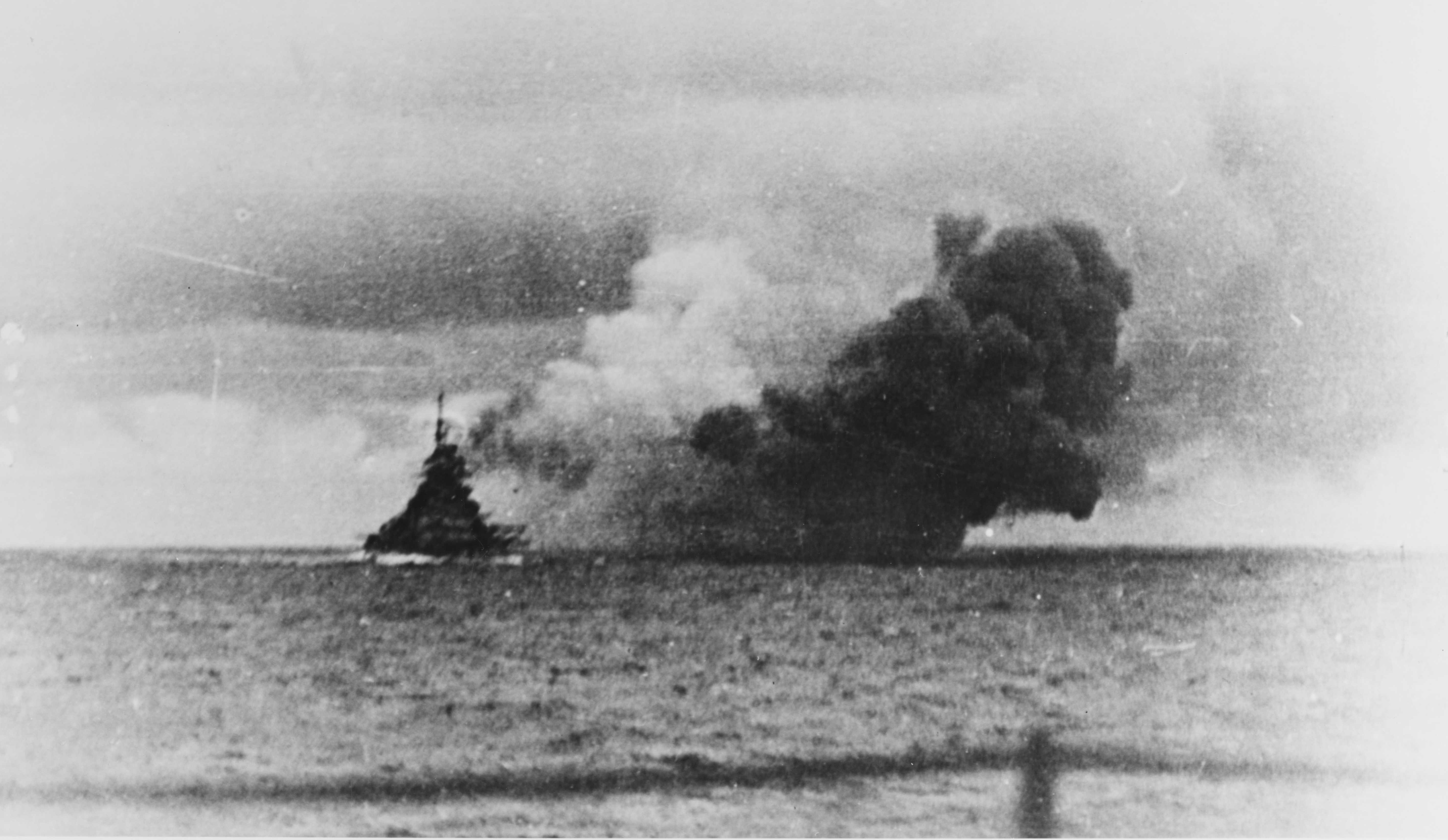 El acorazado Bismarck durante la batalla del estrecho de Dinamarca